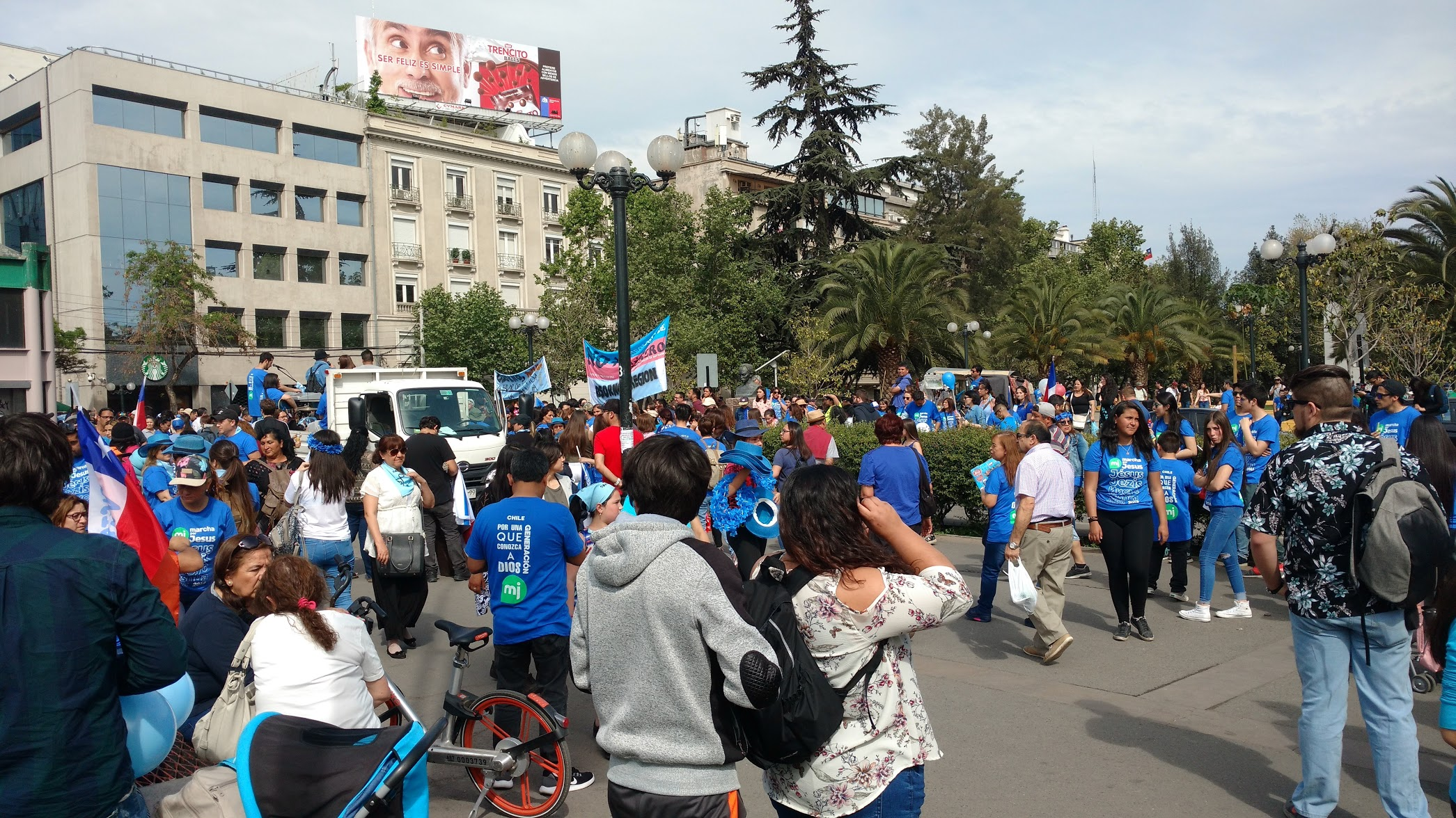 Marcha contra la Ideología de Género / Marcha por Jesús, Chile 2018